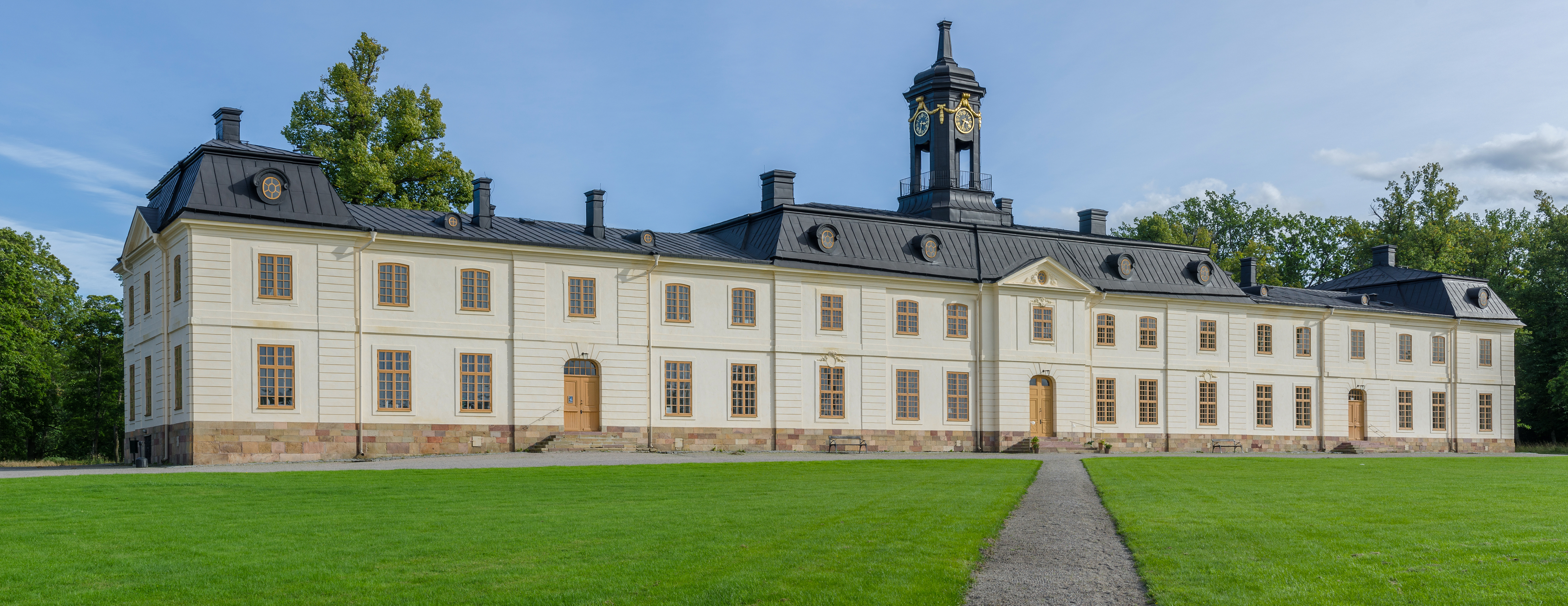 Svartsjö palace, August 2012. Ekerö, Stockholm County, Sverige.